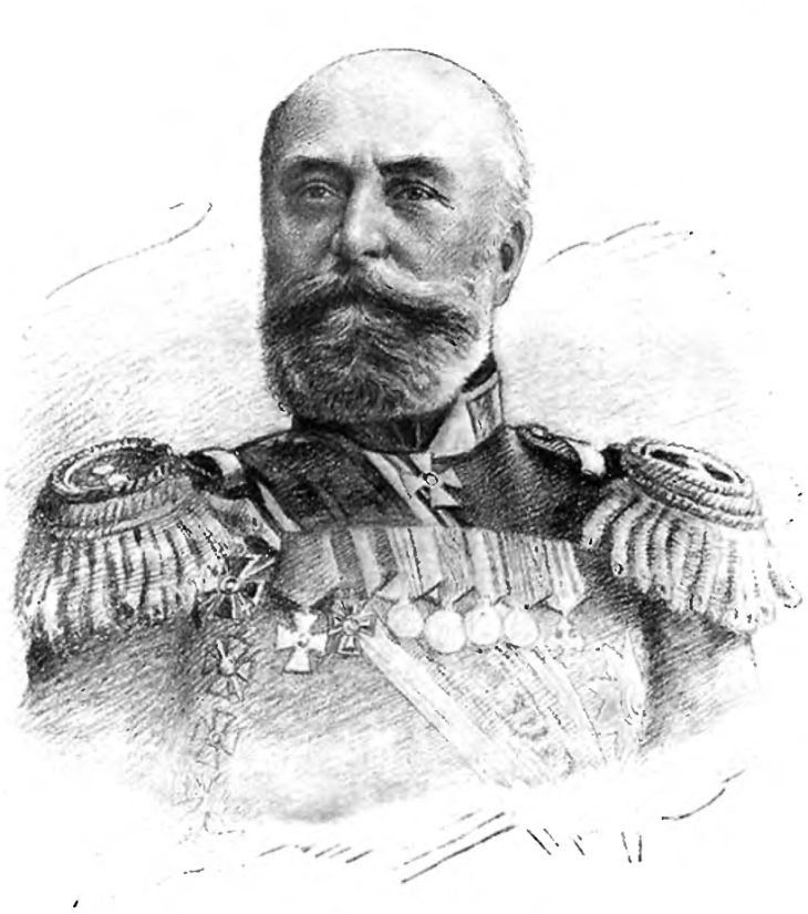 Владимир Александрович Ирманов, русский генерал, герой русско-японской и Первой мировой войн